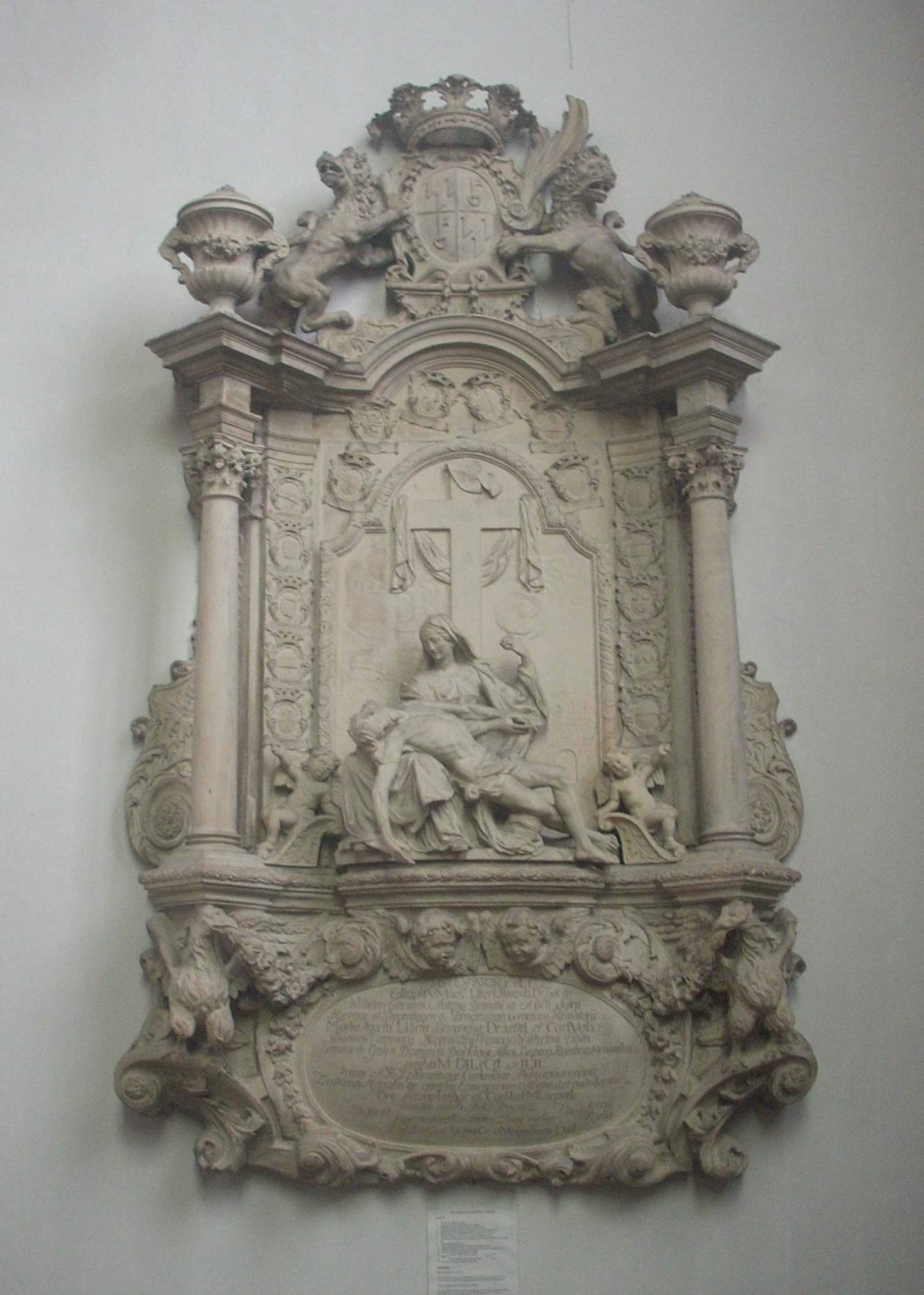 Haltern, kath. Pfarrkirche St. Sixtus, Epitaph des Wilhelm Goswin Anton von Galen von Johann Wilhelm Gröninger (?), 1710